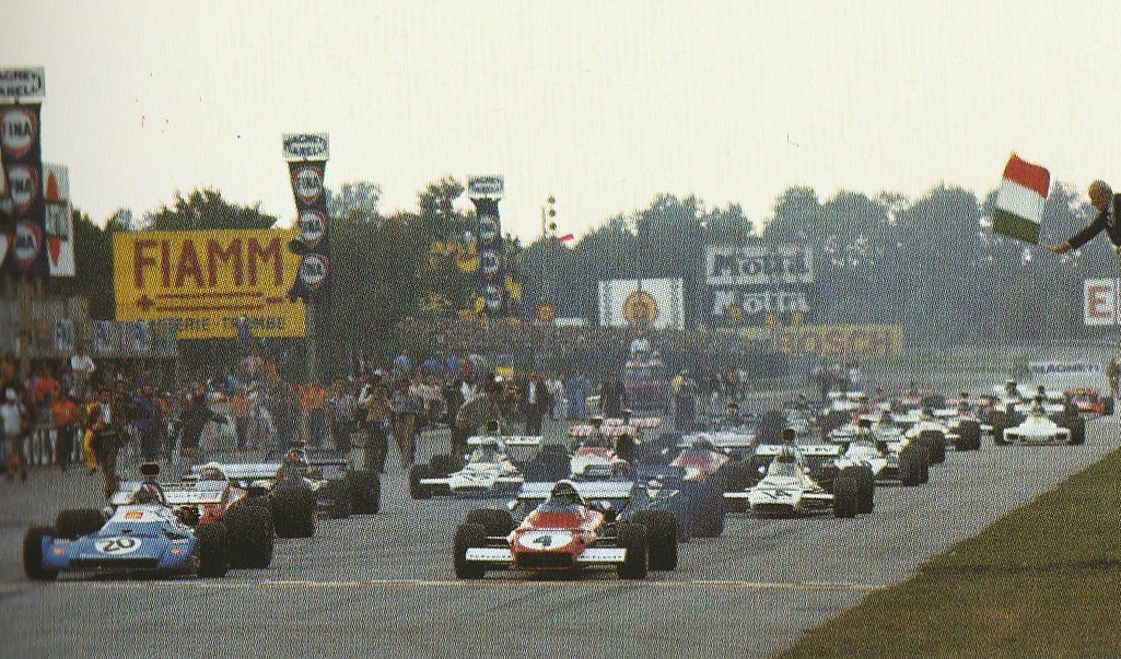 Monza, Autodromo Nazionale, 10 settembre 1972. Partenza del Gran Premio d'Italia 1972; si riconoscono il poleman Jacky Ickx su Ferrari 312 B2 (n. 4), in seconda posizione Chris Amon su Matra MS120D (n. 20) e in quinta Denny Hulme su McLaren-Ford M19C (n. 14).